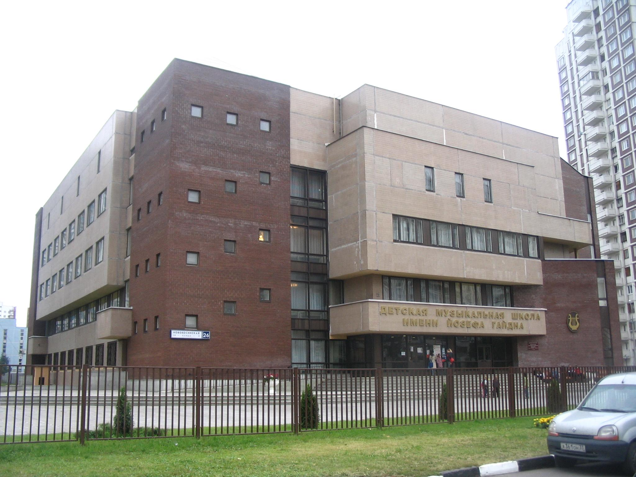 Детскеая музыкальная школа имени Йозефа Гайдна в Новокосино